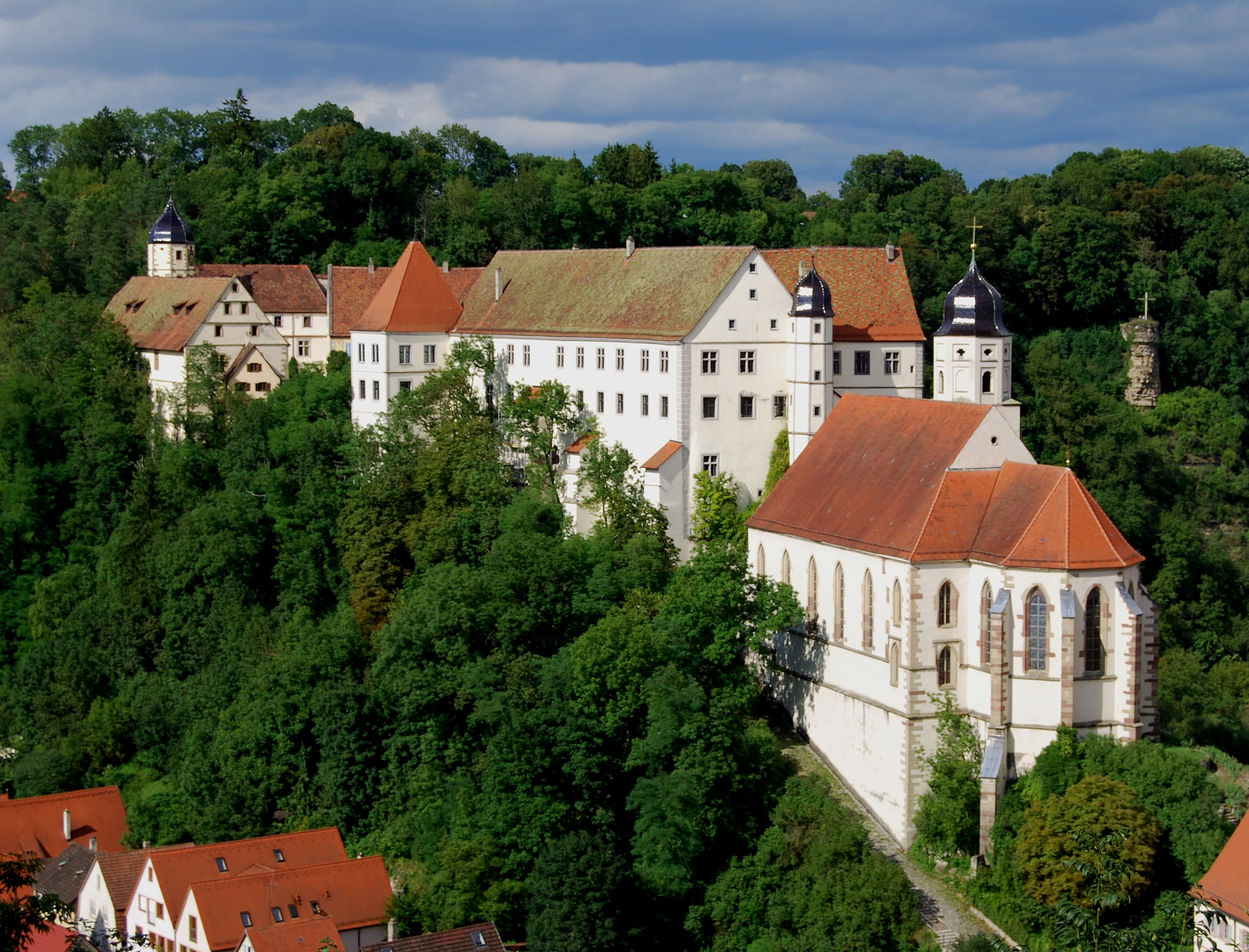 Die Schlosskirche in Haigerloch, aufgenommen aus der Oberstadt